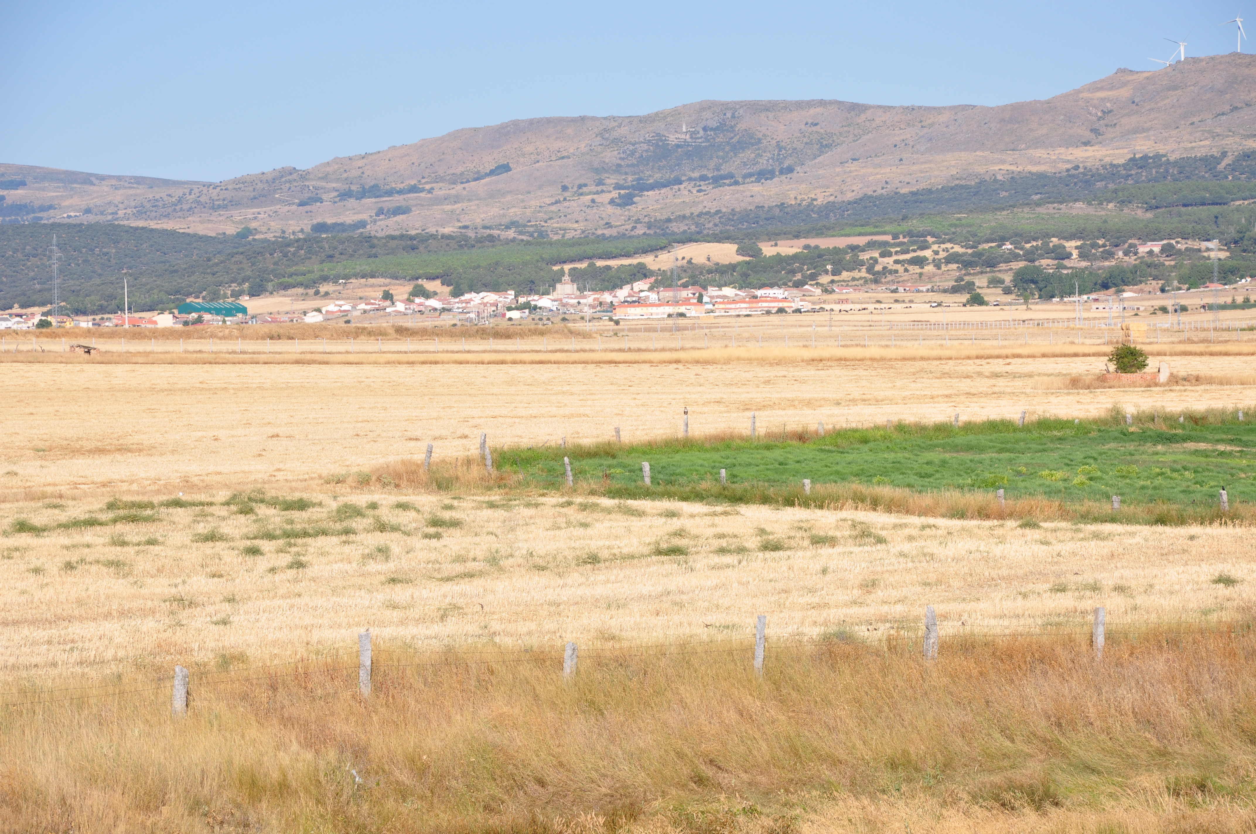 Panorama de Muñana desde La Torre (Ávila), España.